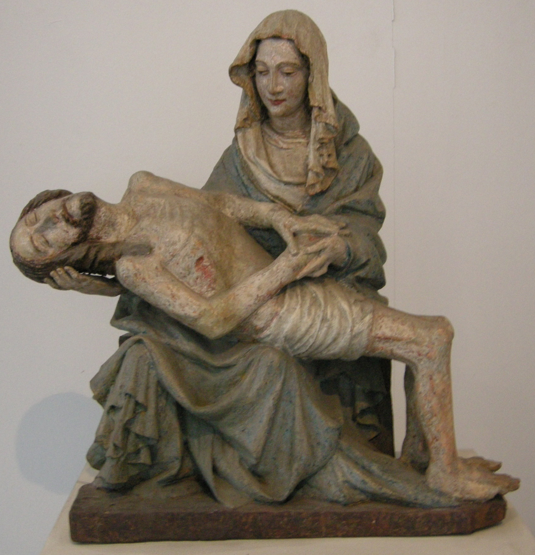 Museo diocesano di klagenfurt, pietà, 1420 circa, da st. michael am zollfeld